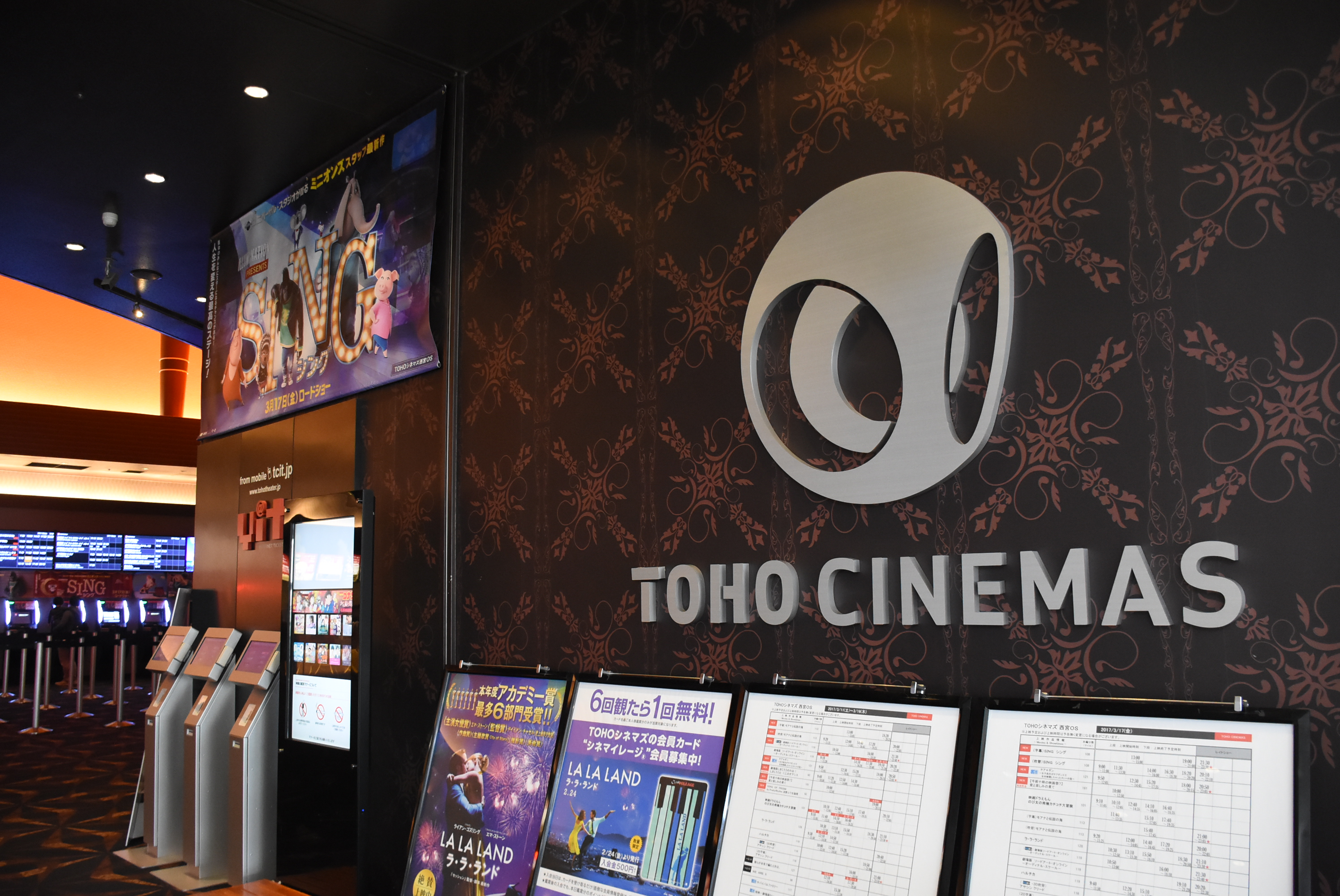 TOHOシネマズ西宮OSにあるTOHOシネマズのロゴです